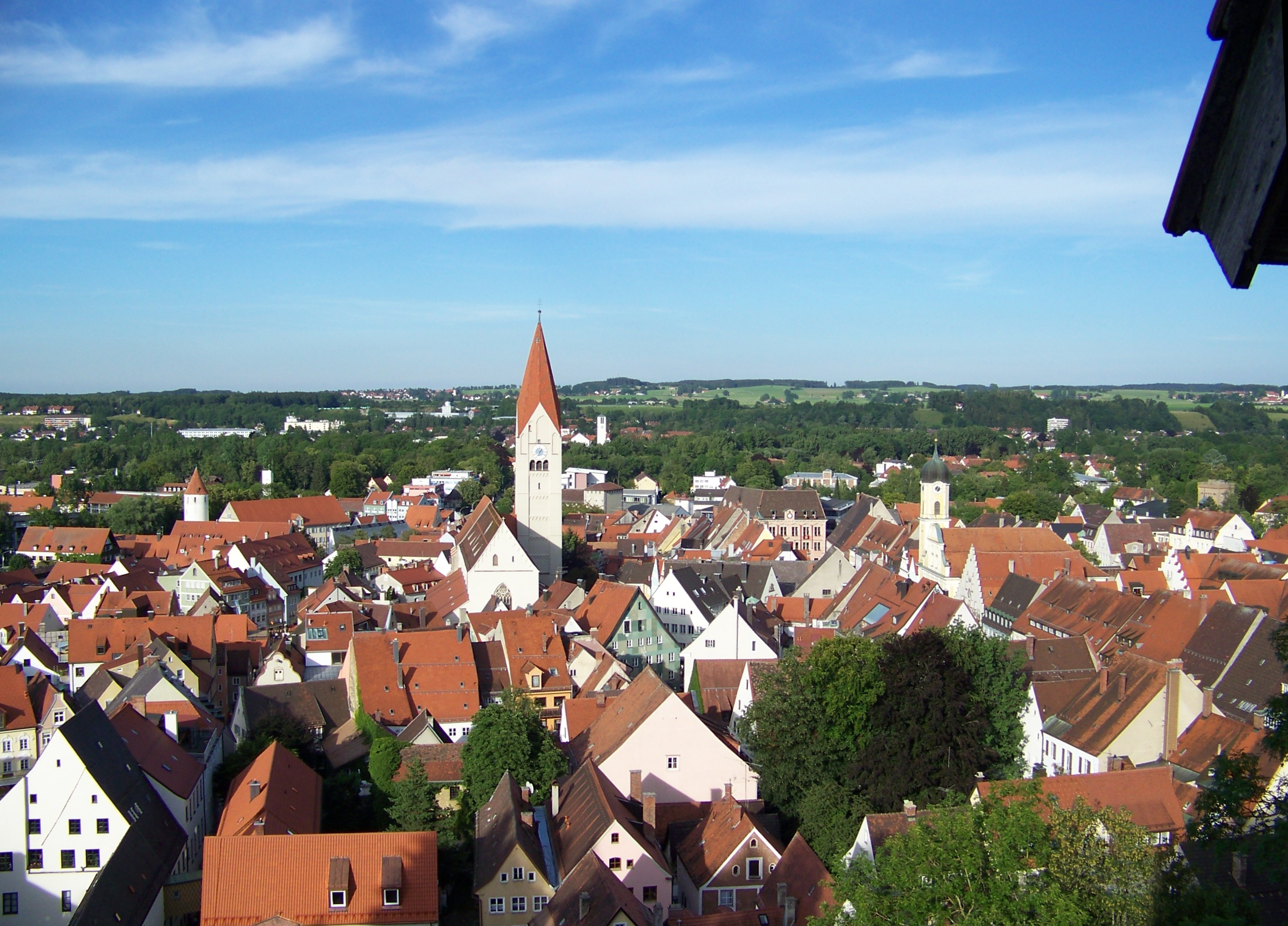 Die Kaufbeurer Altstadt von der Feuerwarte des Fünfknopfturms aus.